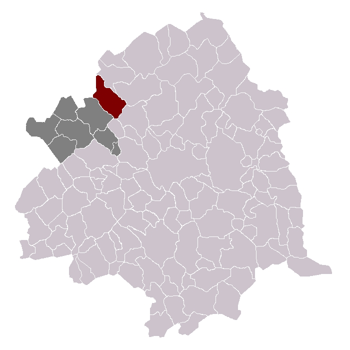 Frelinghem canton d'Armentière, arrondissement de Lille